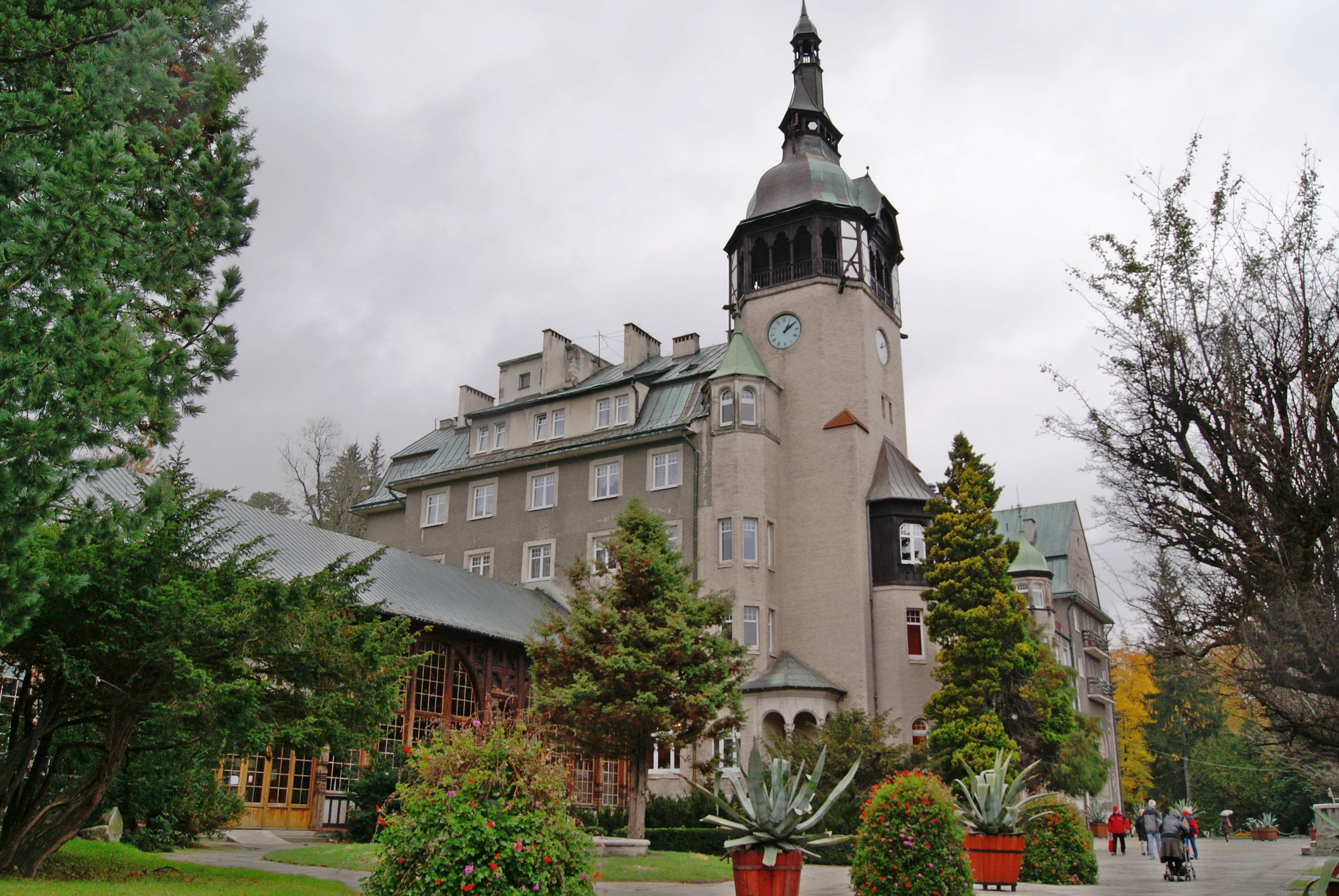 Świeradów Zdrój - Dom Zdrojowy, odbudowany w 1899r. Powstał w miejscu poprzedniego "Domu Źródlanego" (1781 r) zniszczonego w czasie pożaru w 1895r. (zabytek nr 351/903/J z 14.01.88)